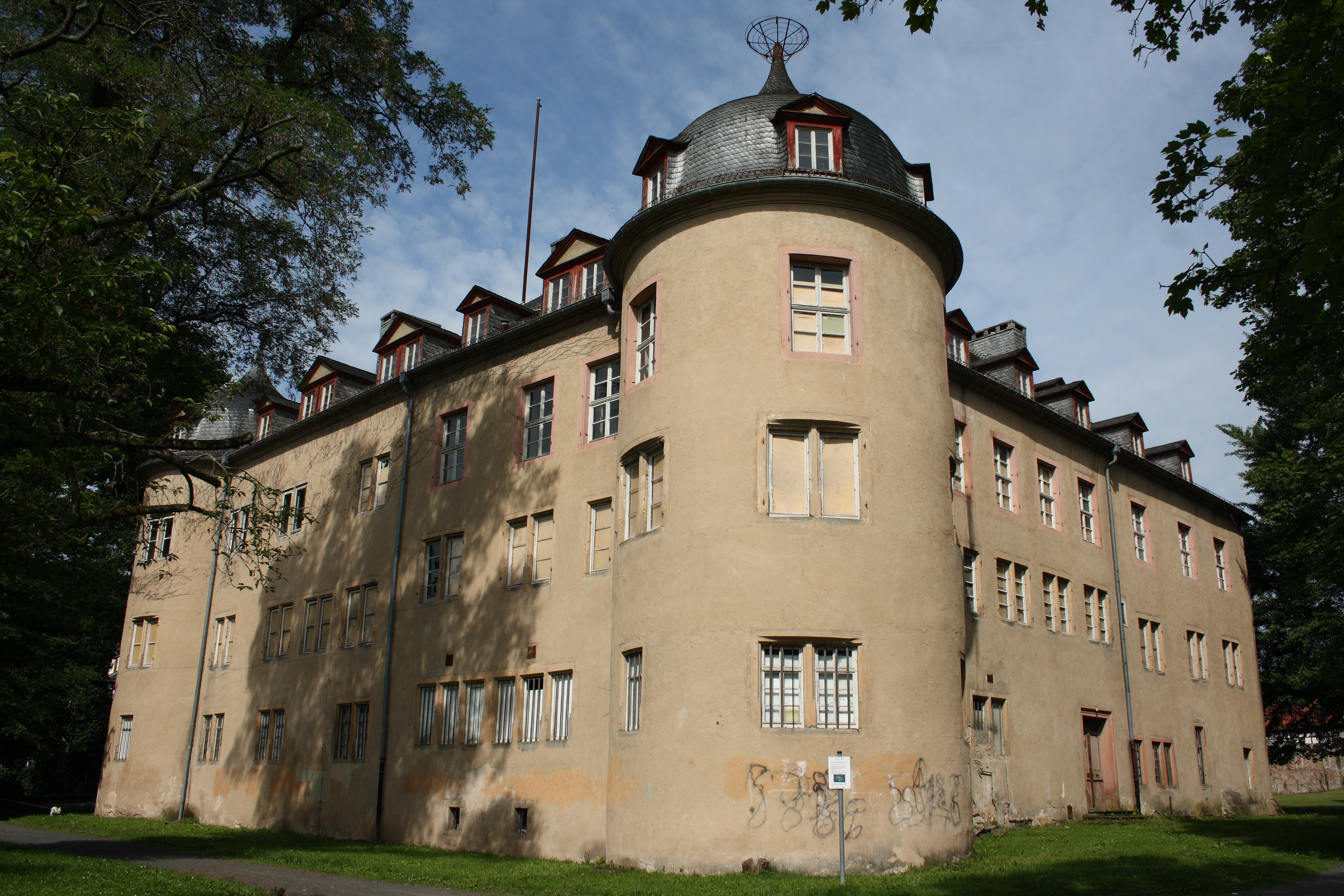 Schloss Wächtersbach, Schloss 1, in Wächtersbach im Main-Kinzig-Kreis (Hessen)